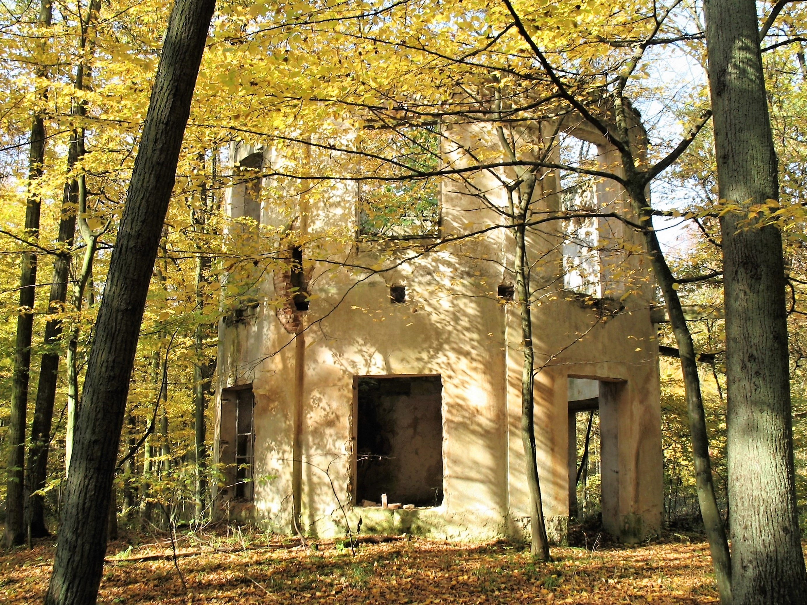 Ruiny tzv. Zahrádeckého (též Novozámeckého) letohrádku na katastru obce Holany v krajinné památkové zóně Zahrádecko v okrese Česká Lípa